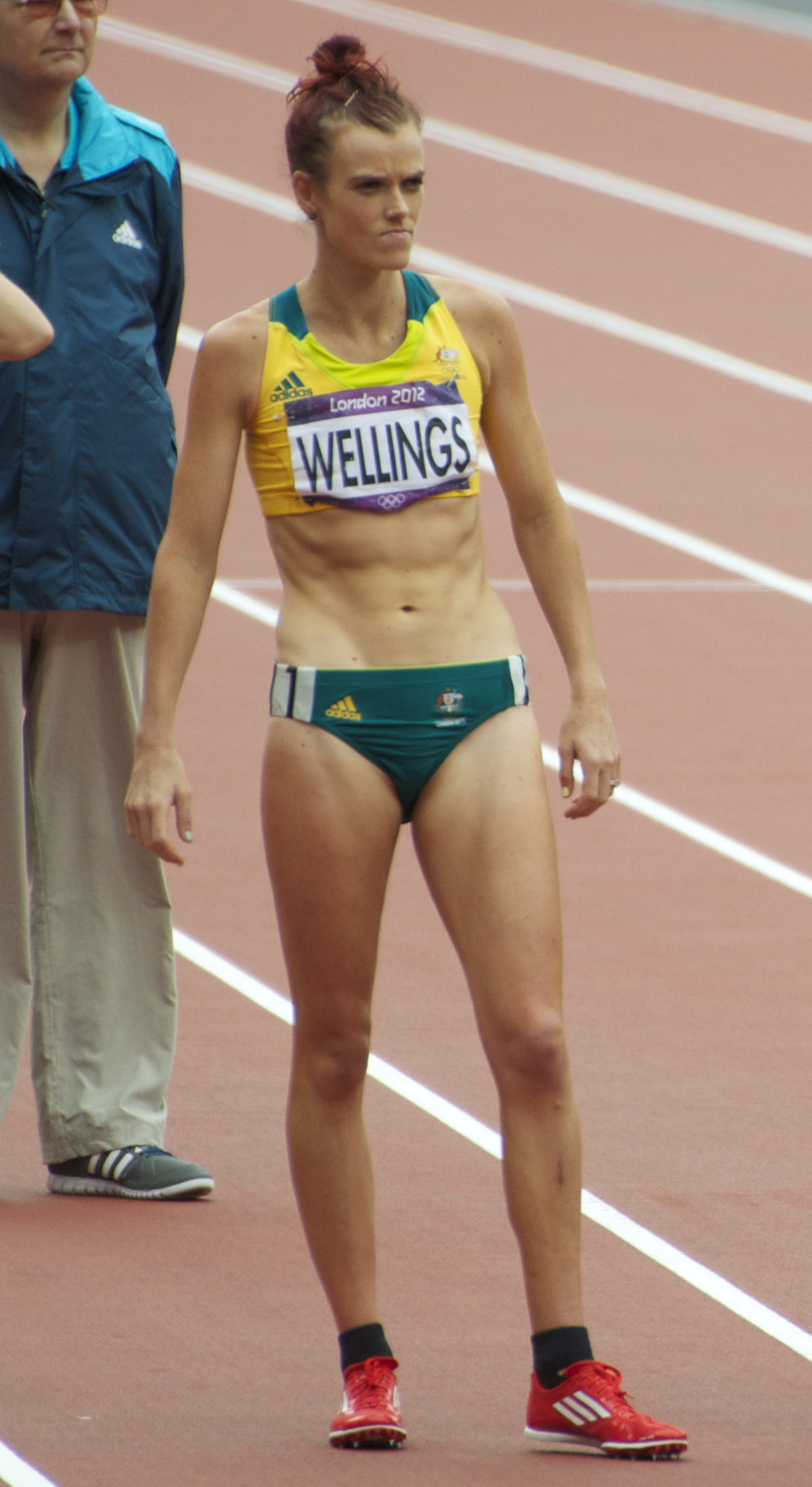 Women's 5000m